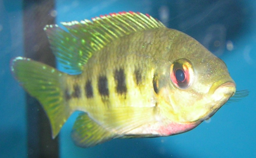 Tilapia mariae in an aquarium